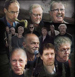 En bild på alla medlemmar av Good morning Blues